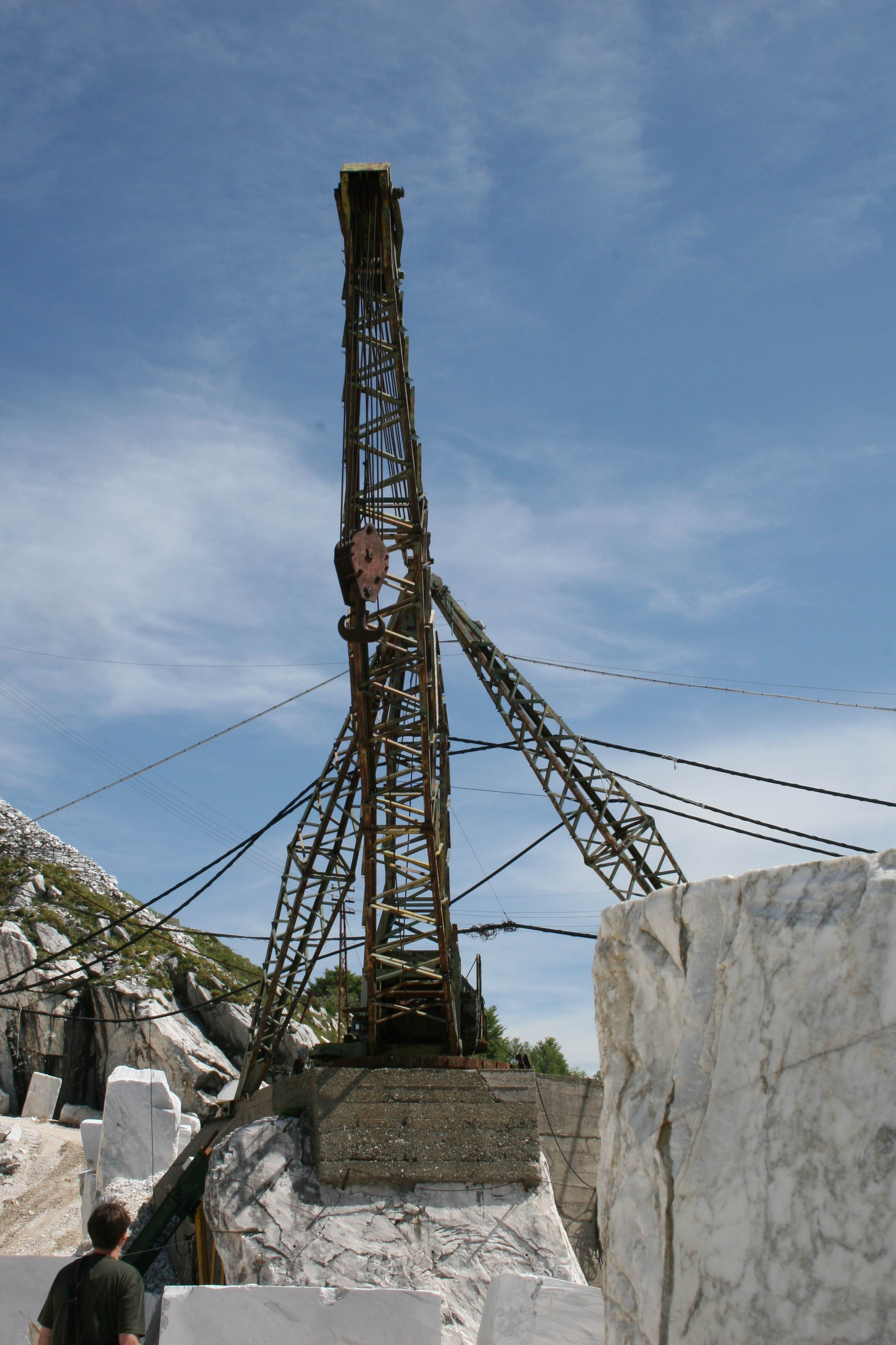 Derrick in einem Steinbruch für Carrara-Marmor (außer Betrieb)